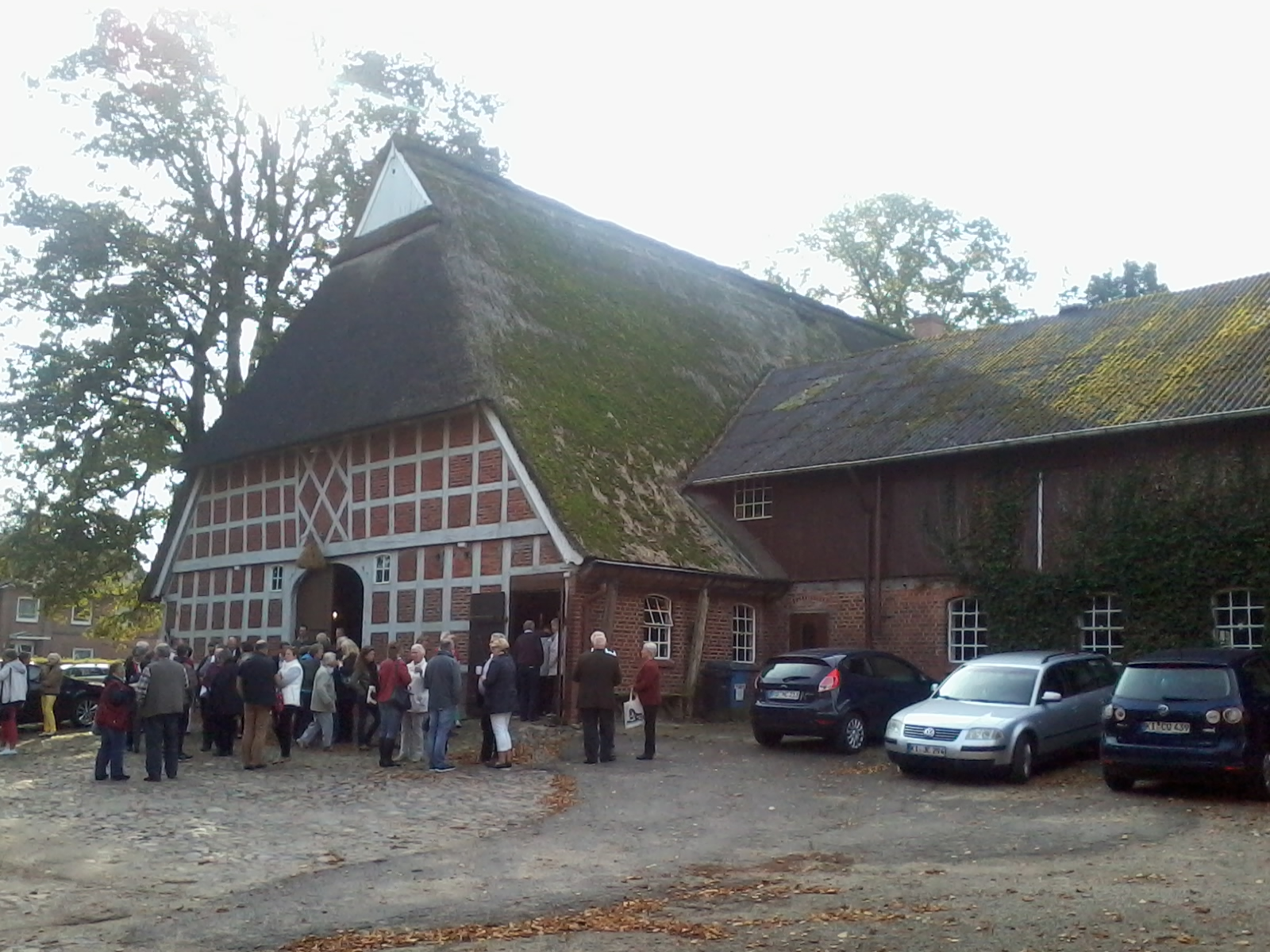 Puck'scher Hof in Kiel-Rönne beim Erntedank-Gottesdienst 2014